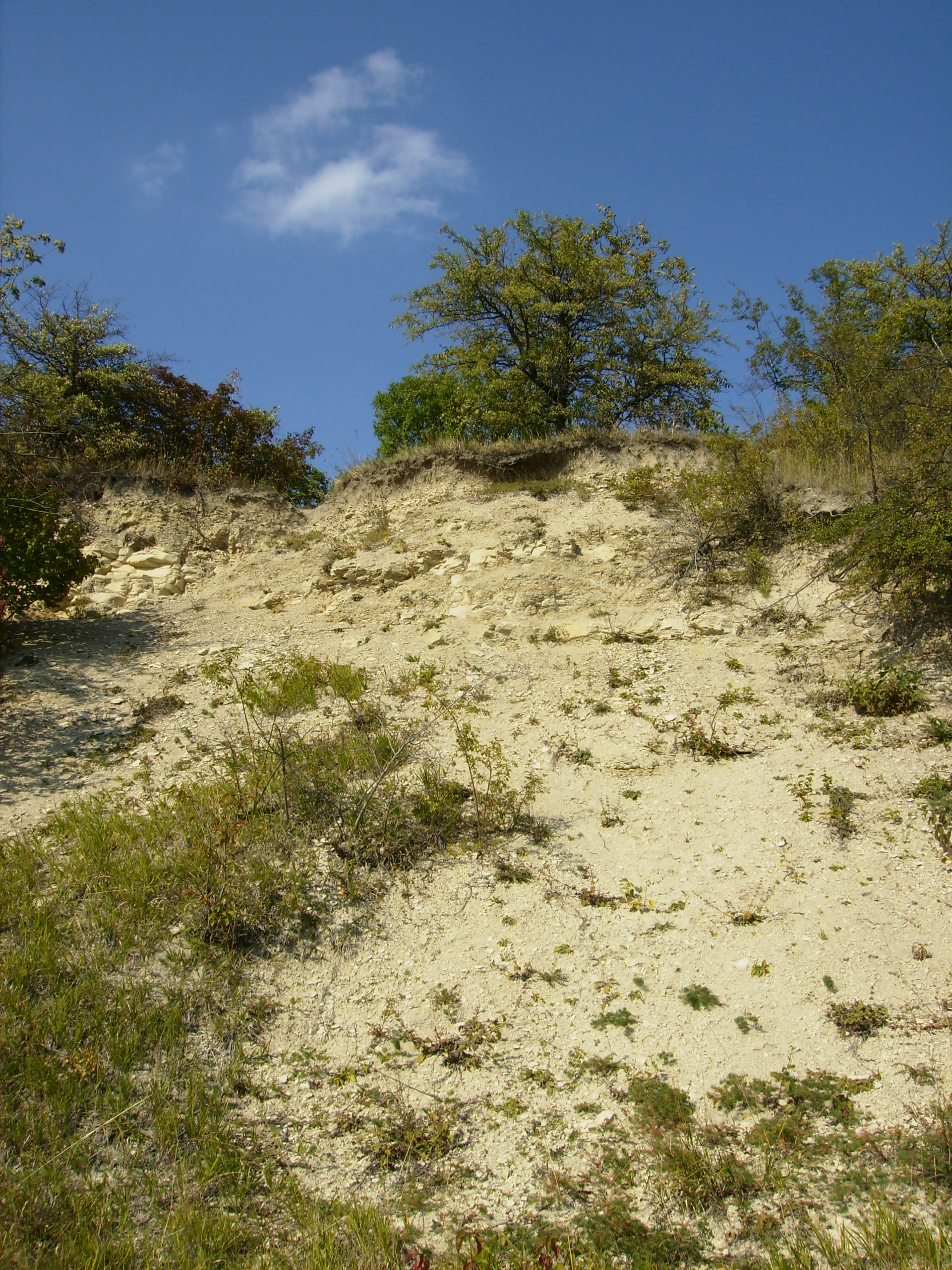 Skala na jiznim svahu Prerovske hury.